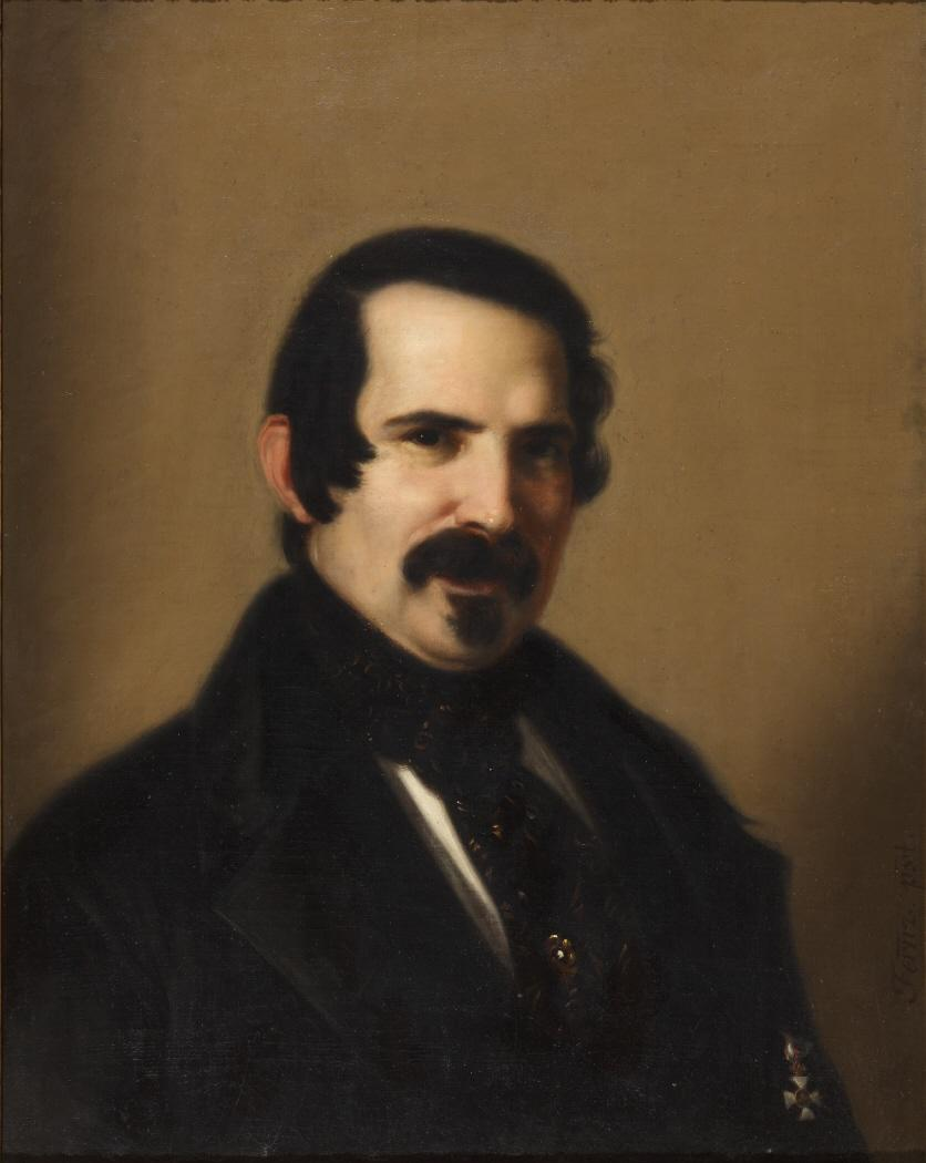 Autorretrato del pintor español Joaquín Manuel Fernández Cruzado (1781-1856).